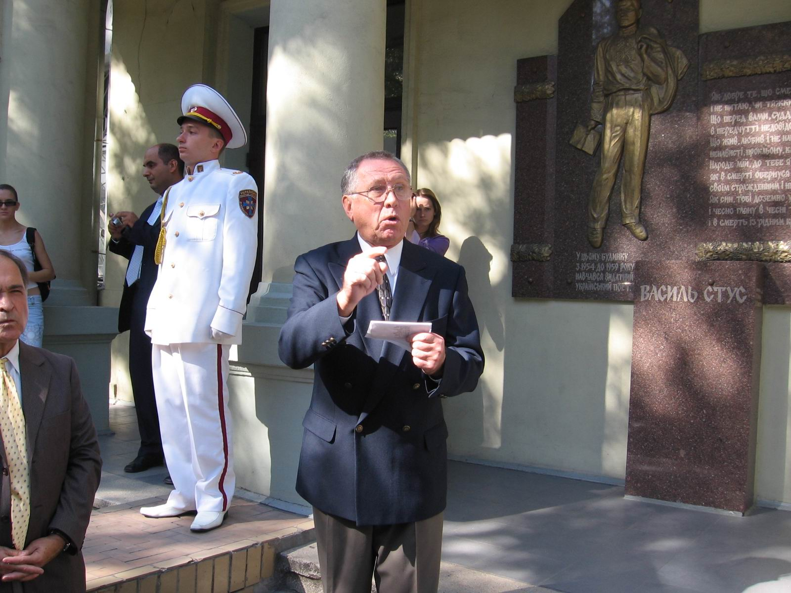 Фото